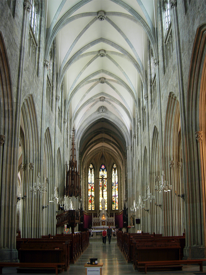 Innenraum der Stiftskirche Admont